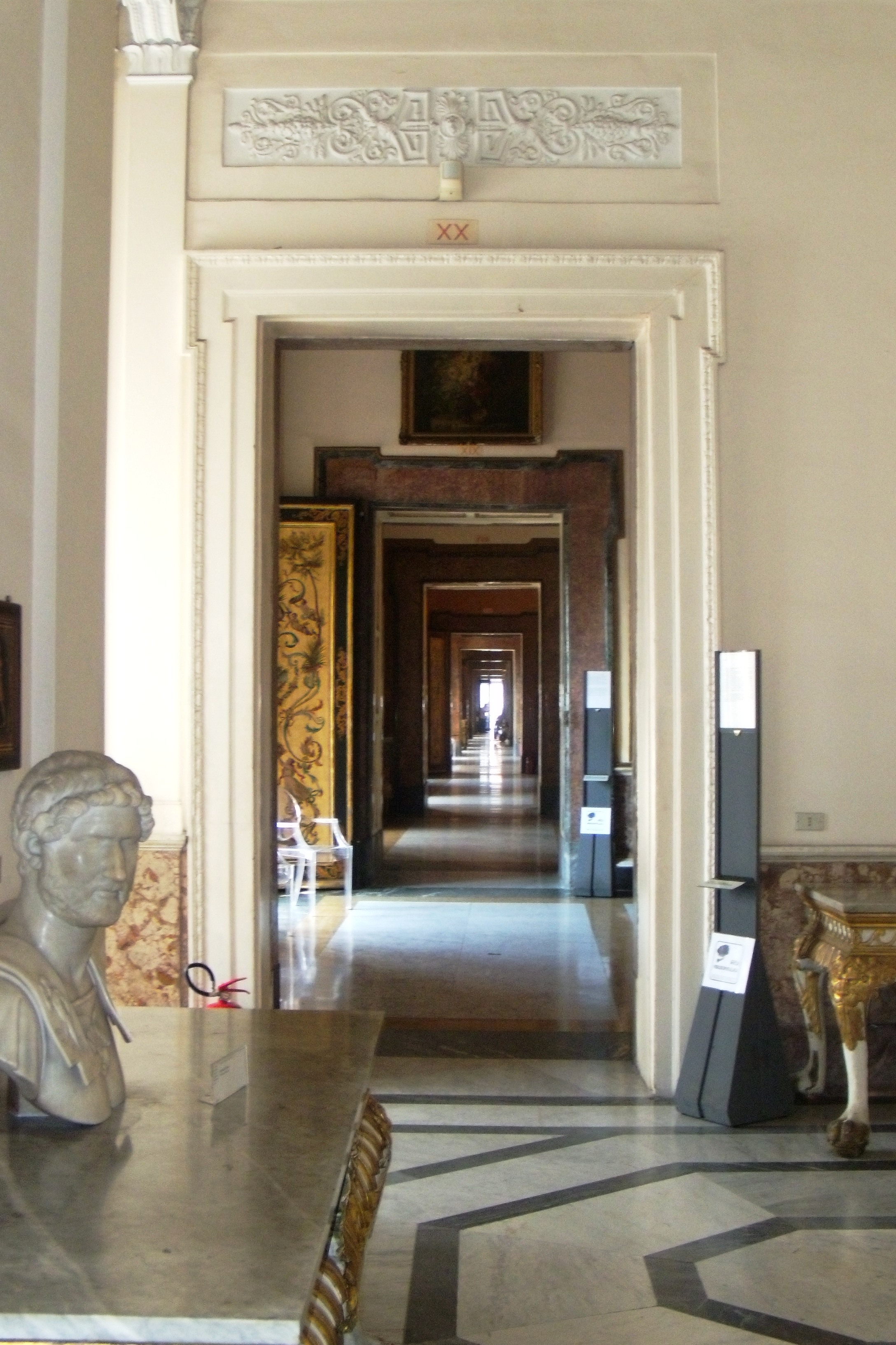 Scorcio degli appartamenti privati del Palazzo Reale di Napoli.